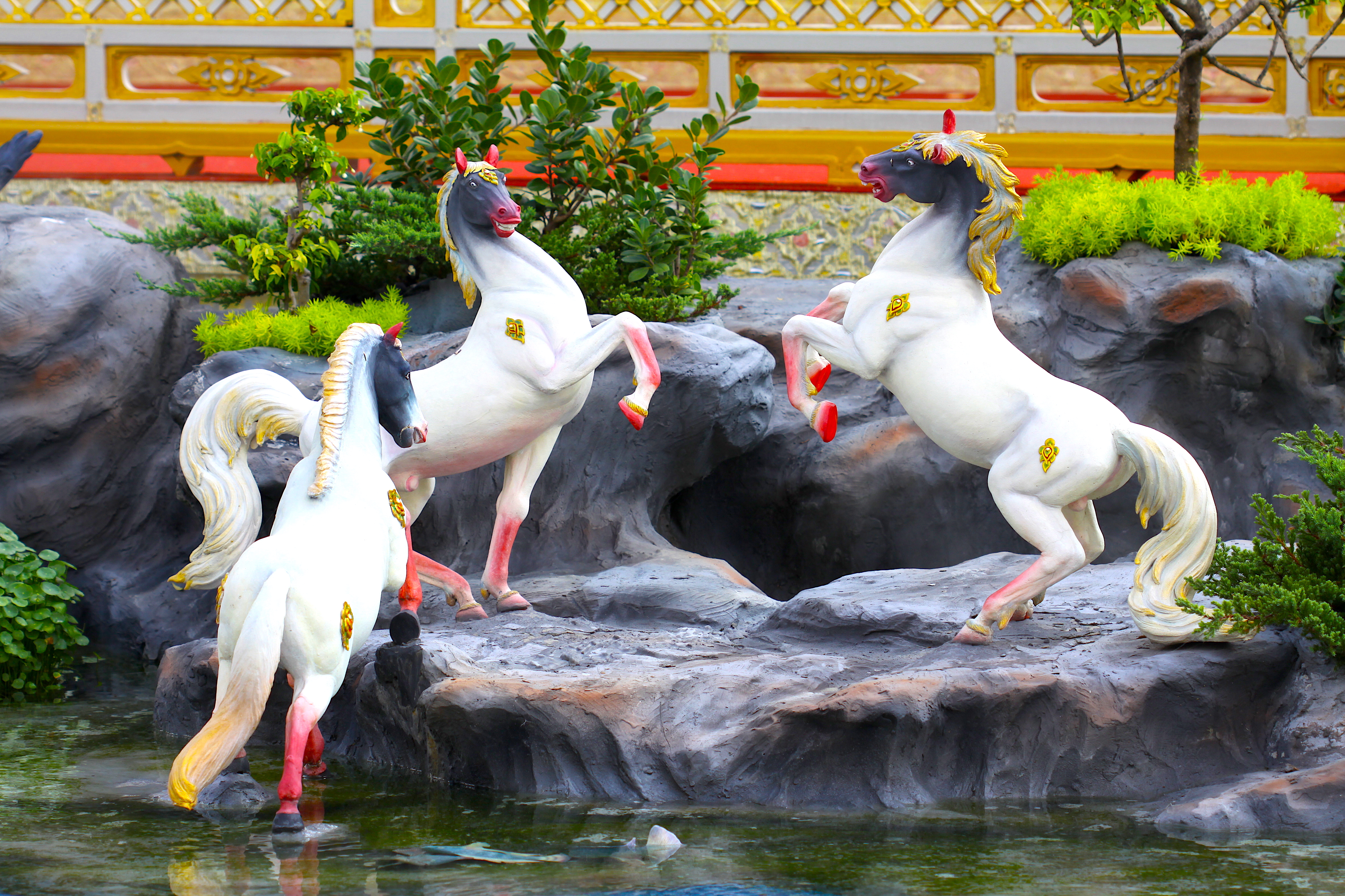 ประติมากรรมสัตว์หิมพานต์